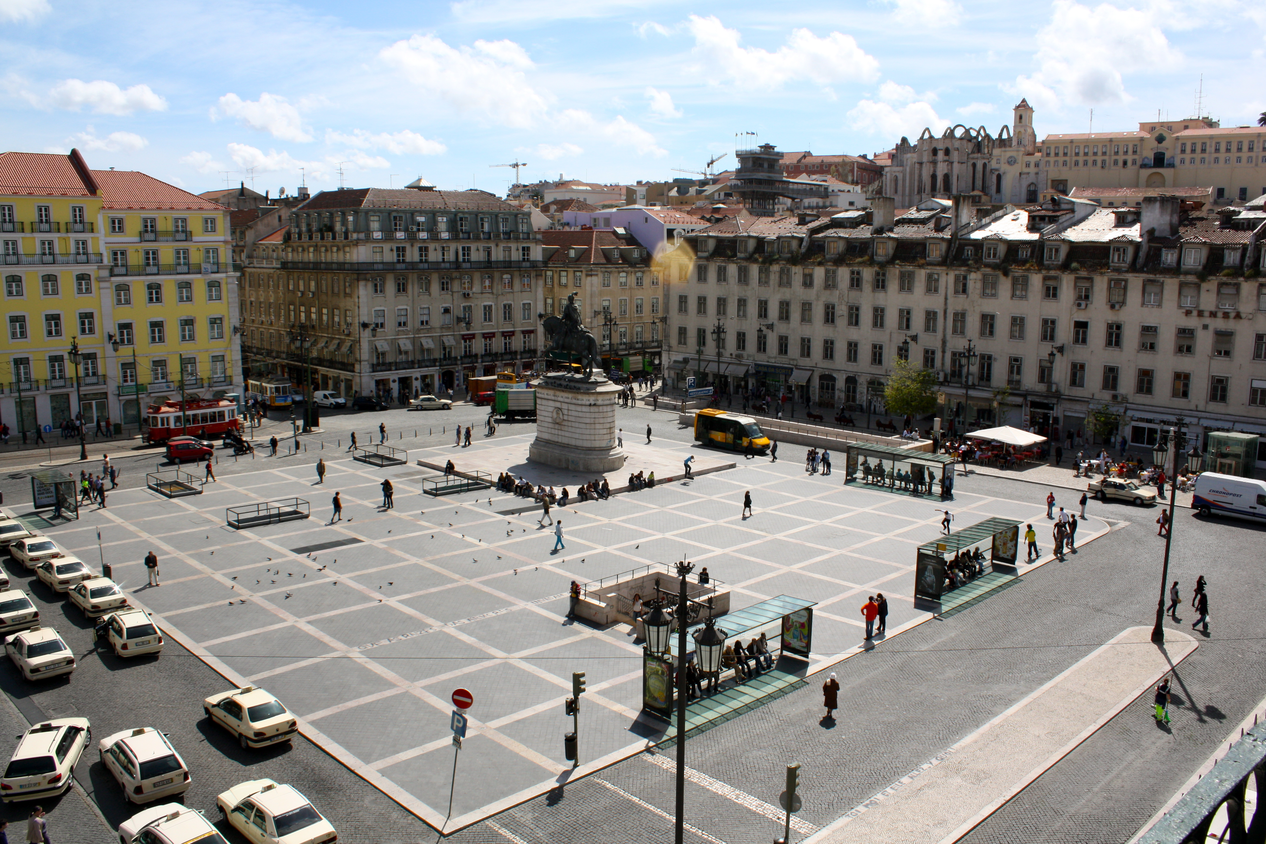 Lisbon One - 82